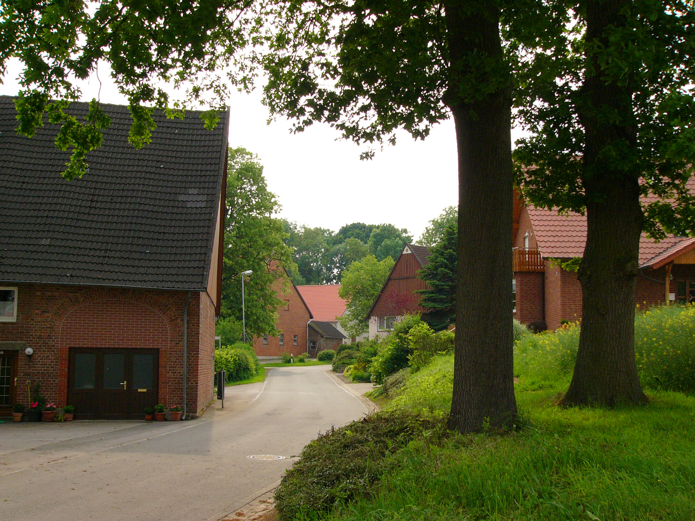 Dorfstraße in Mossenberg-Wöhren, Ortsteil von Blomberg, Germany